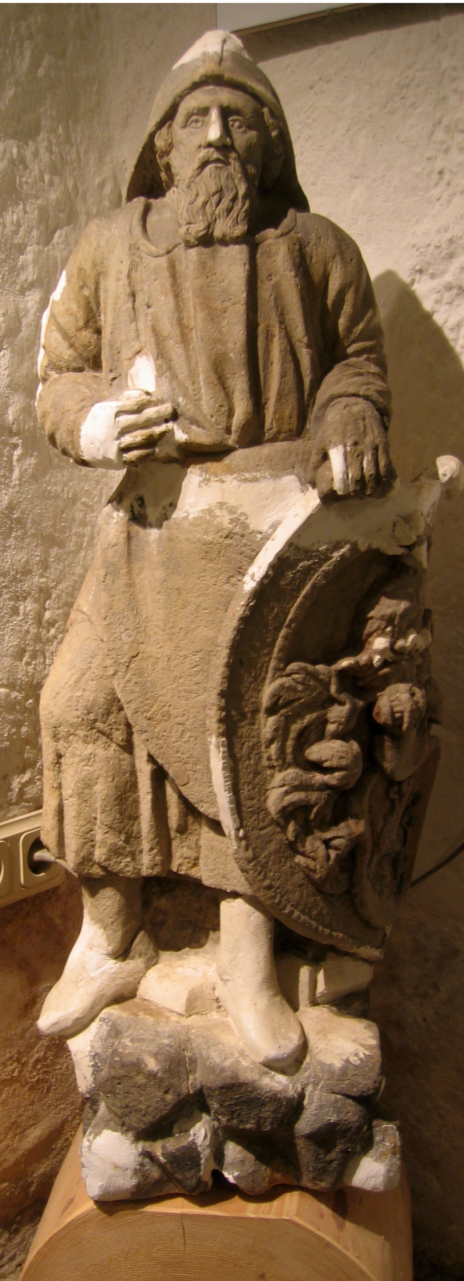 Glashüttenmuseum des Erzgebirges Neuhausen/Erzgeb.